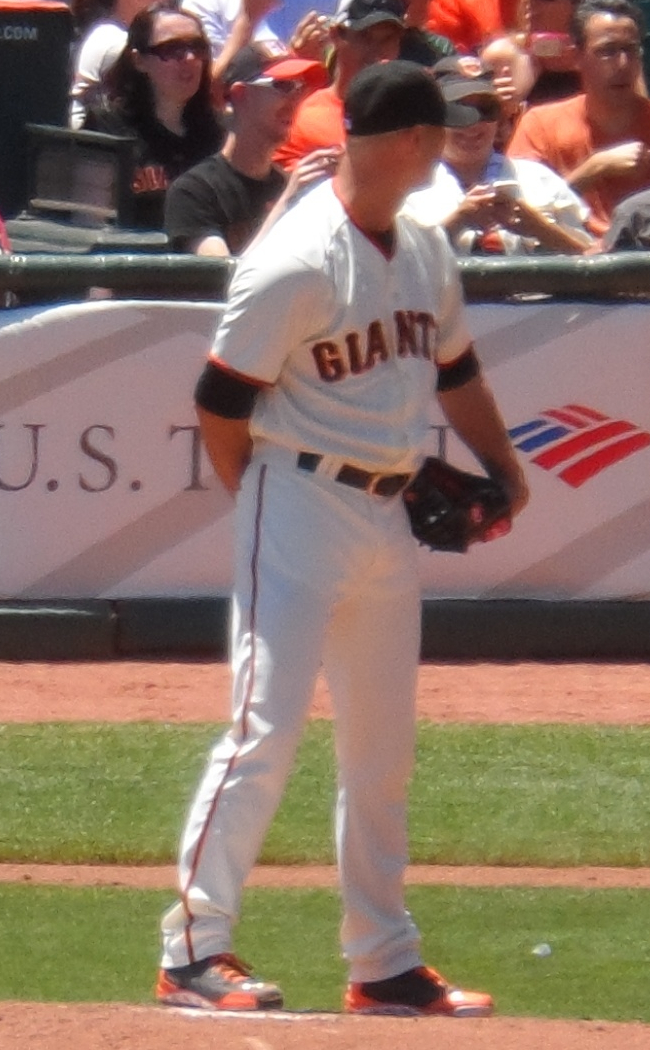 Tim Hudson